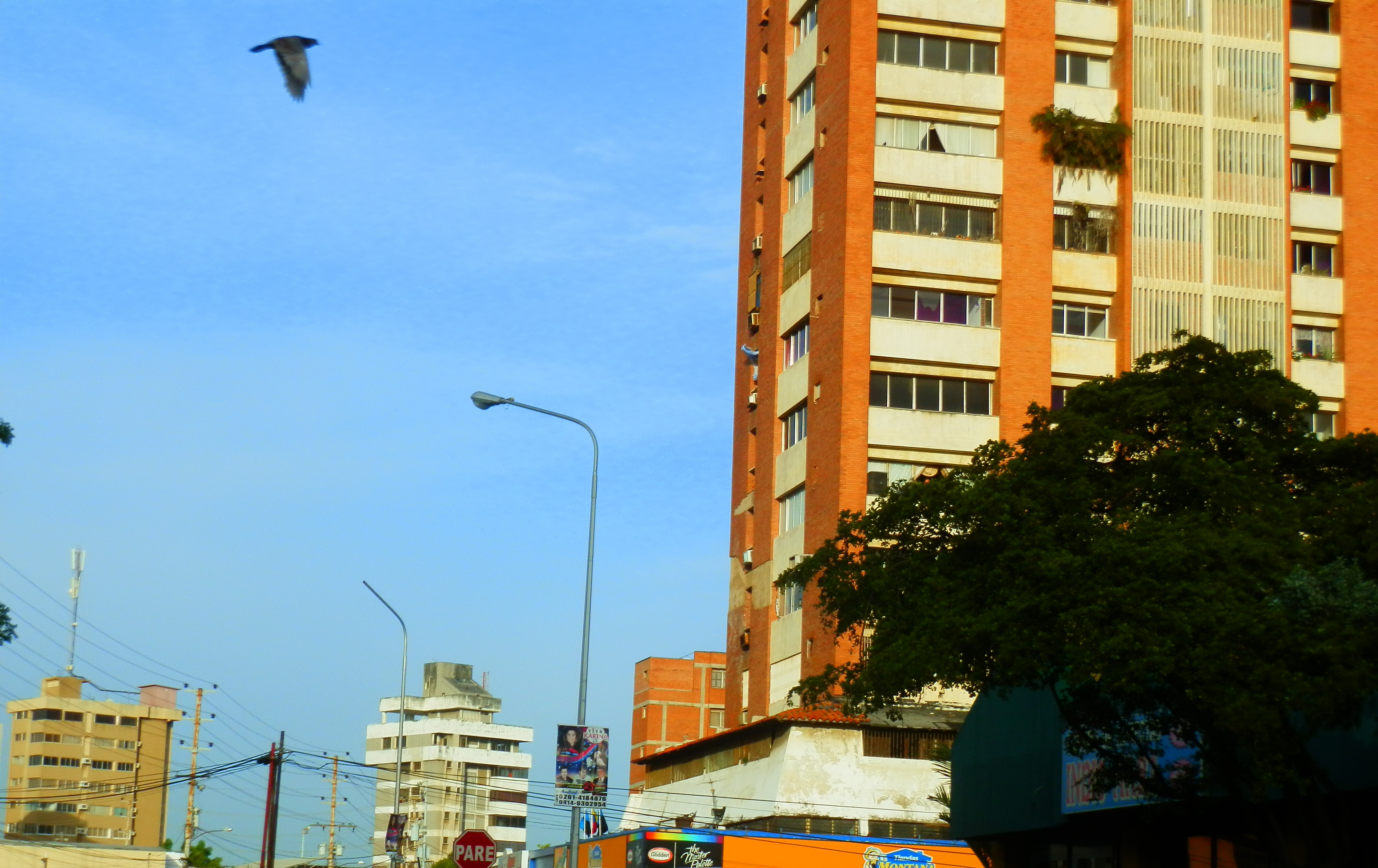 Edificios en Maracaibo